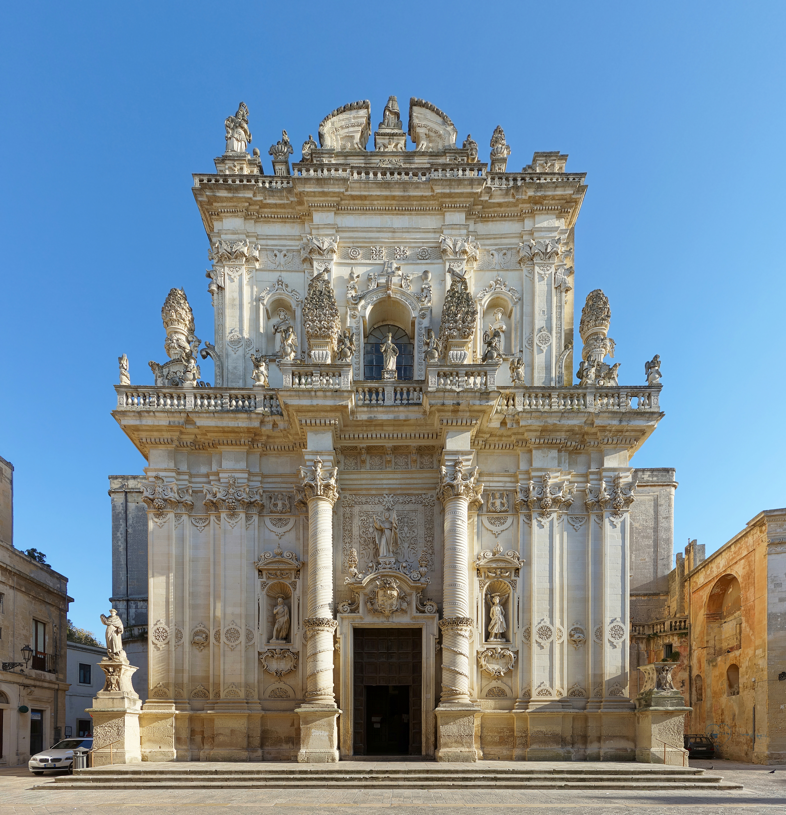 L'église San Giovanni Battista de Lecce.